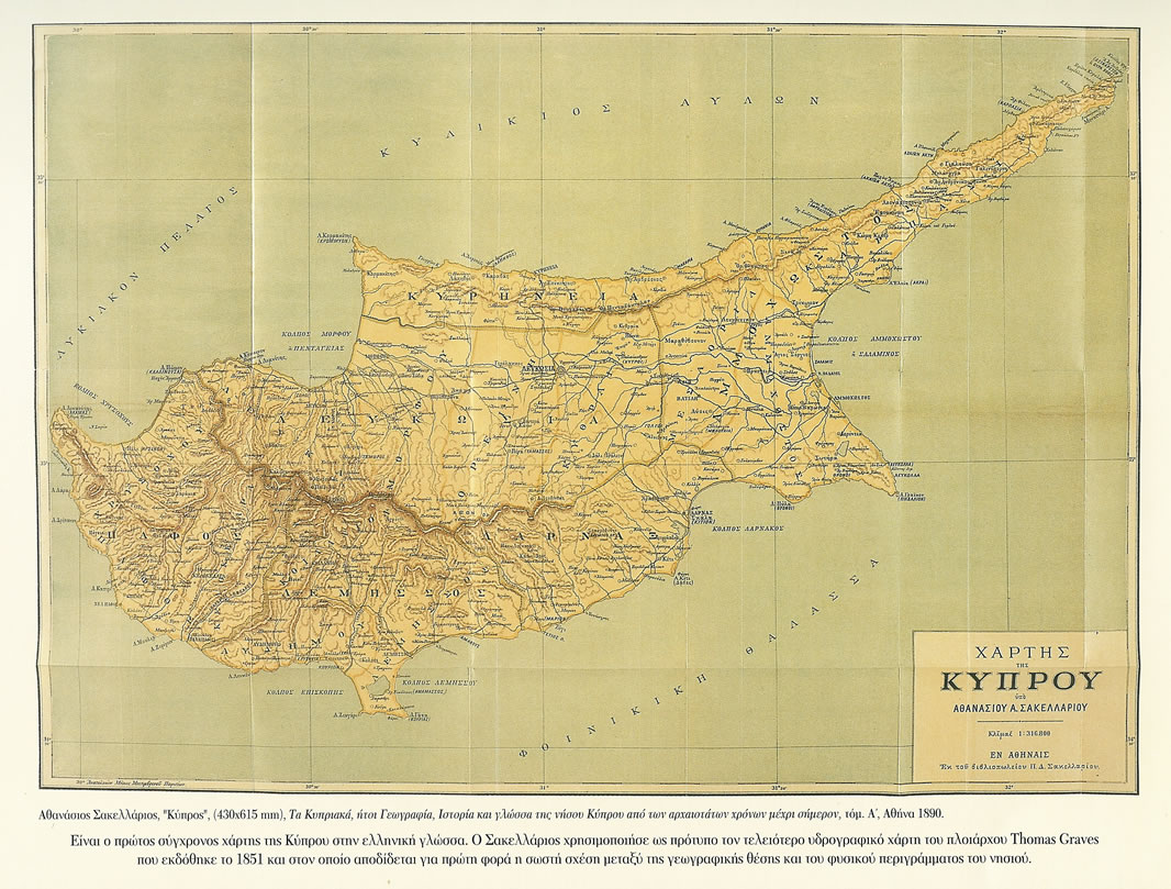 Χάρτης της Κύπρου, υπό του Αθανάσιου Σακελλάριου, 1890